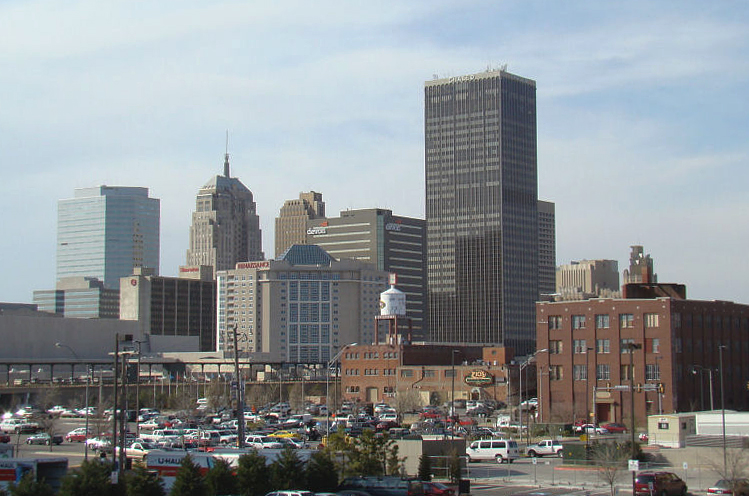 Oklahoma City Skyline